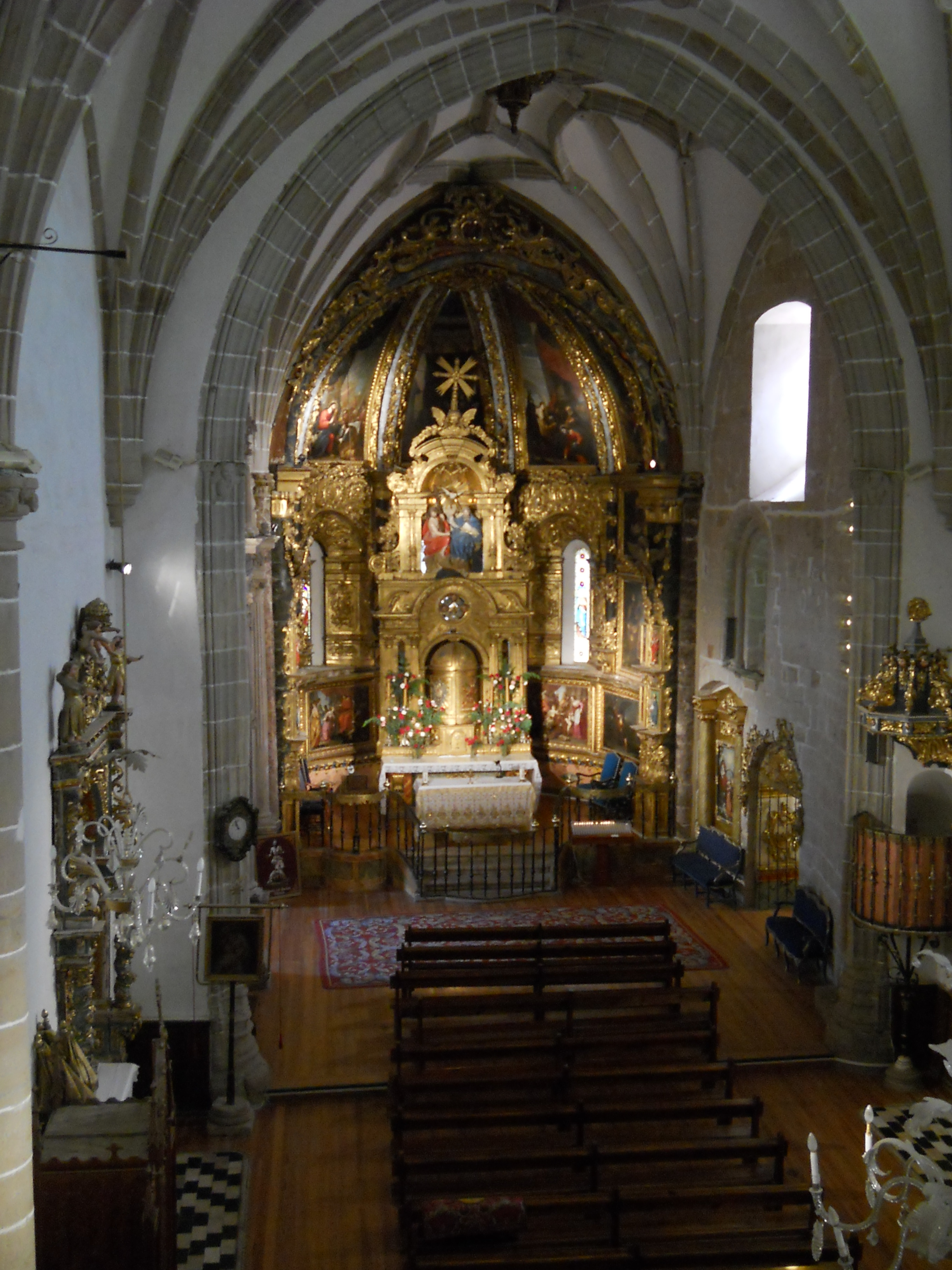 Iglesia de la Santísima Trinidad, Atienza, Guadalajara, España